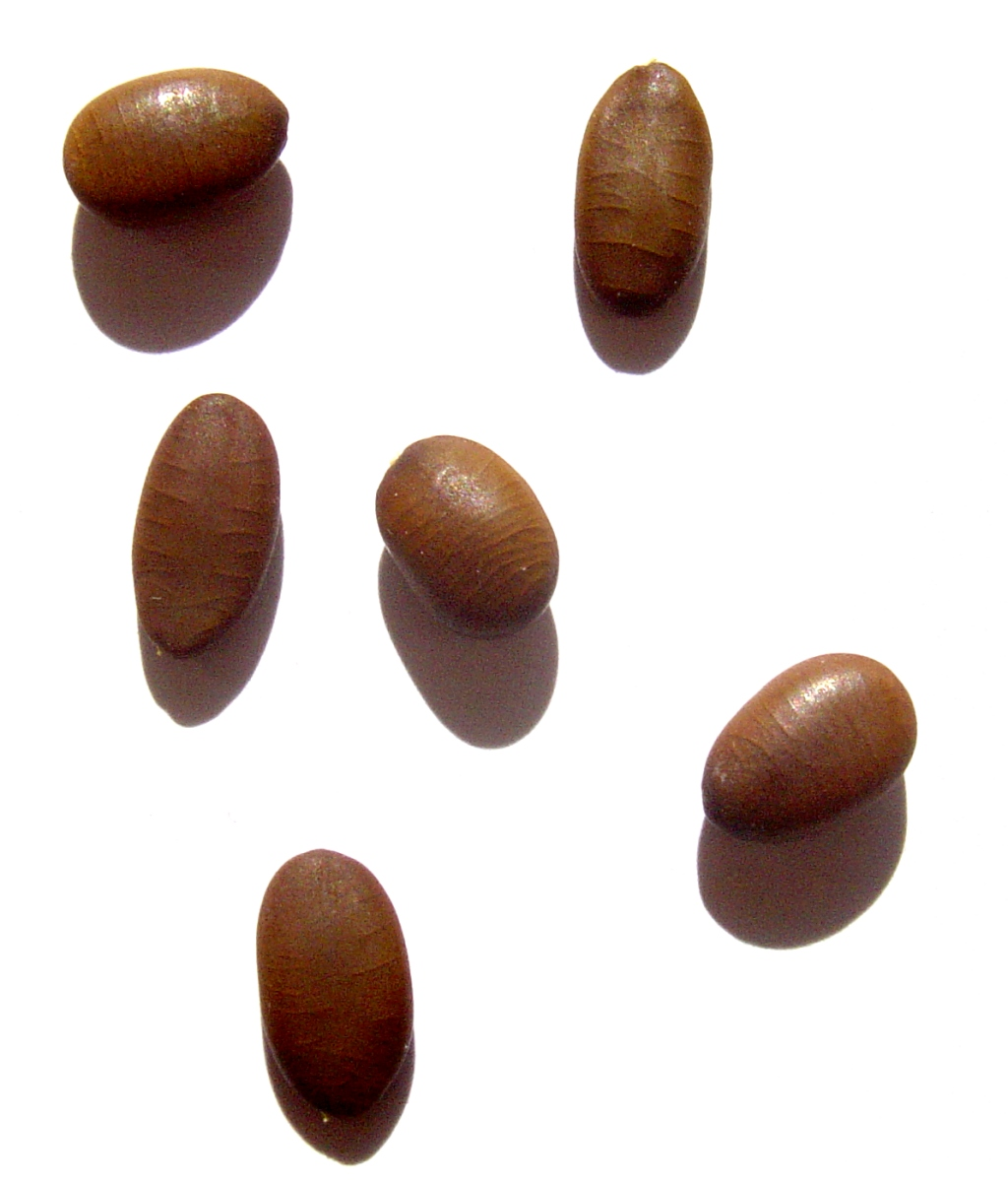 Fèves d'Amérique